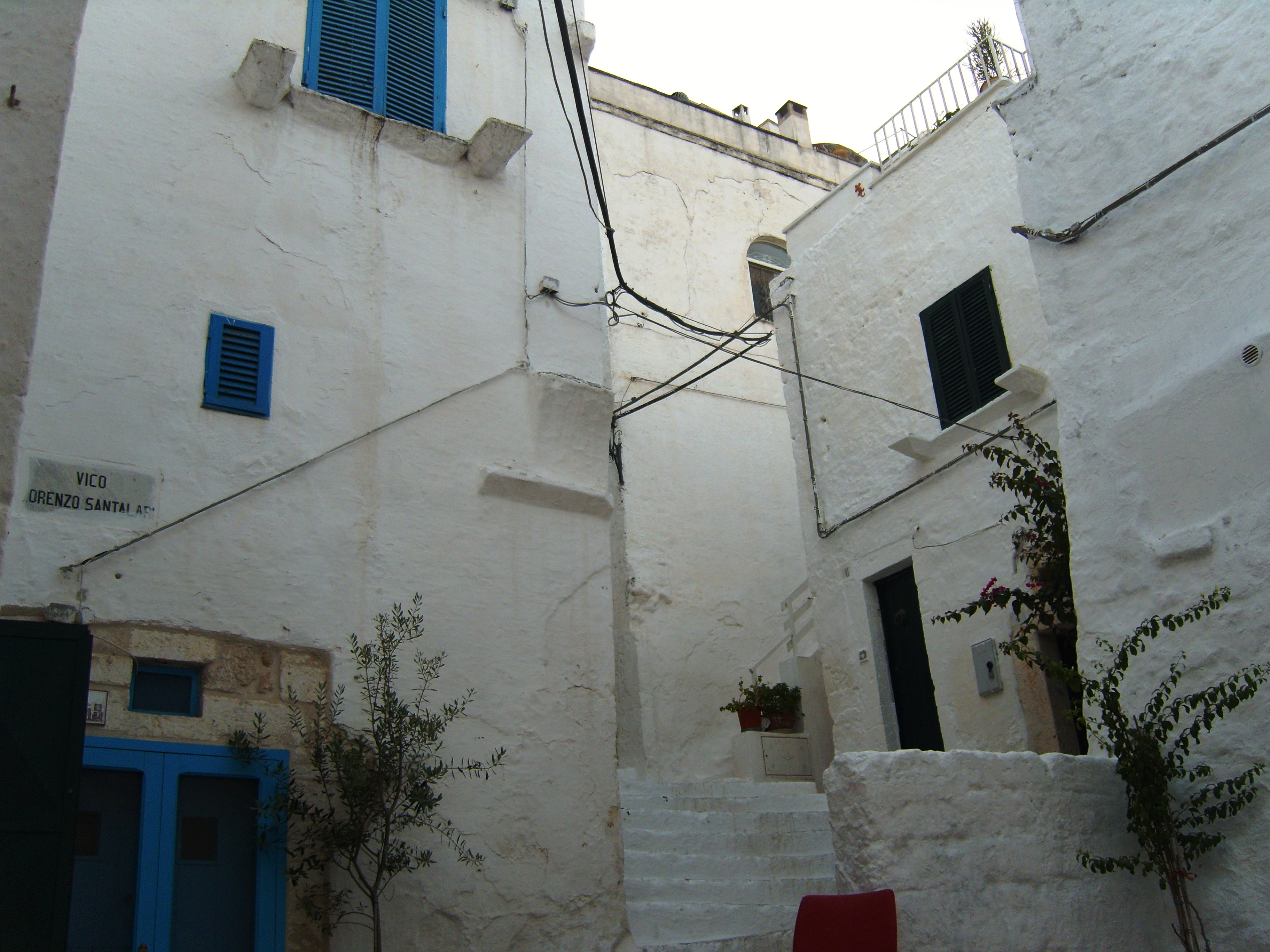 Ostuni (BR) - vico Lorenzo Santalari